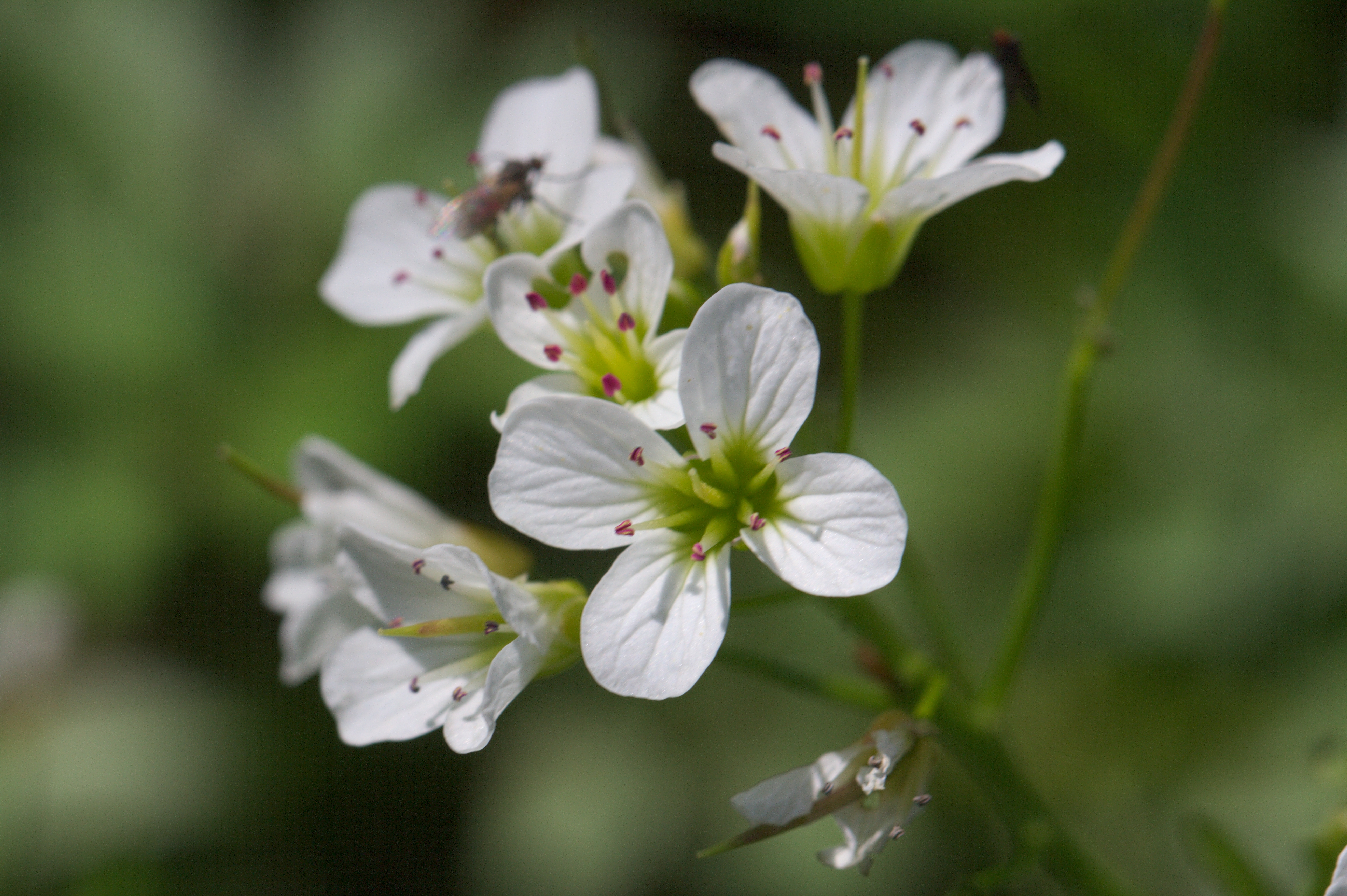 Zámek (přírodní památka) - Cardamine amara L., řeřišnice hořká - status ohrožení v ČR: není